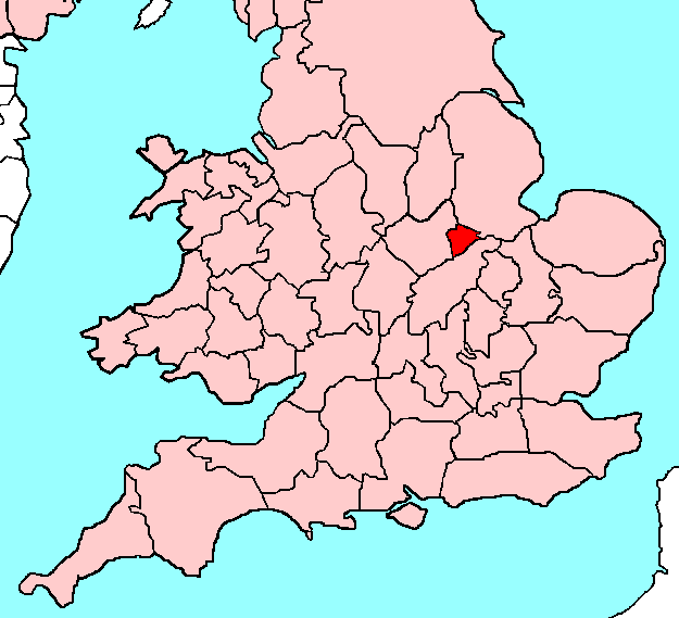 Rutland